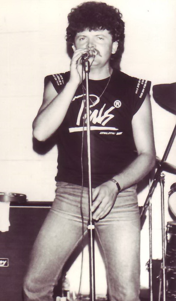 A zenekar tagjairól készült felvétel.